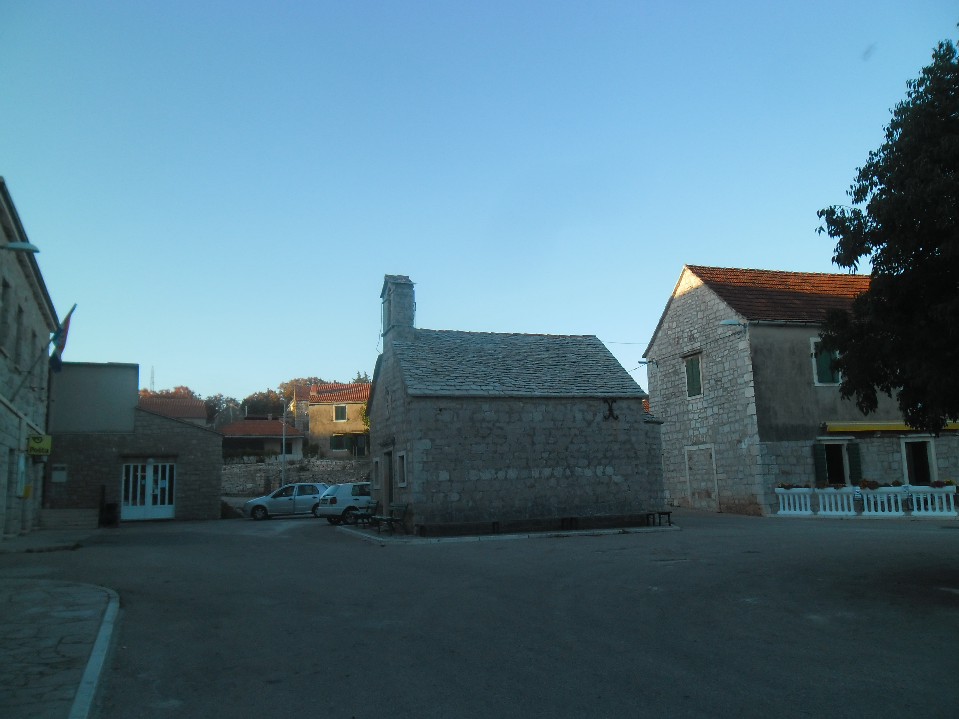 otok Brač